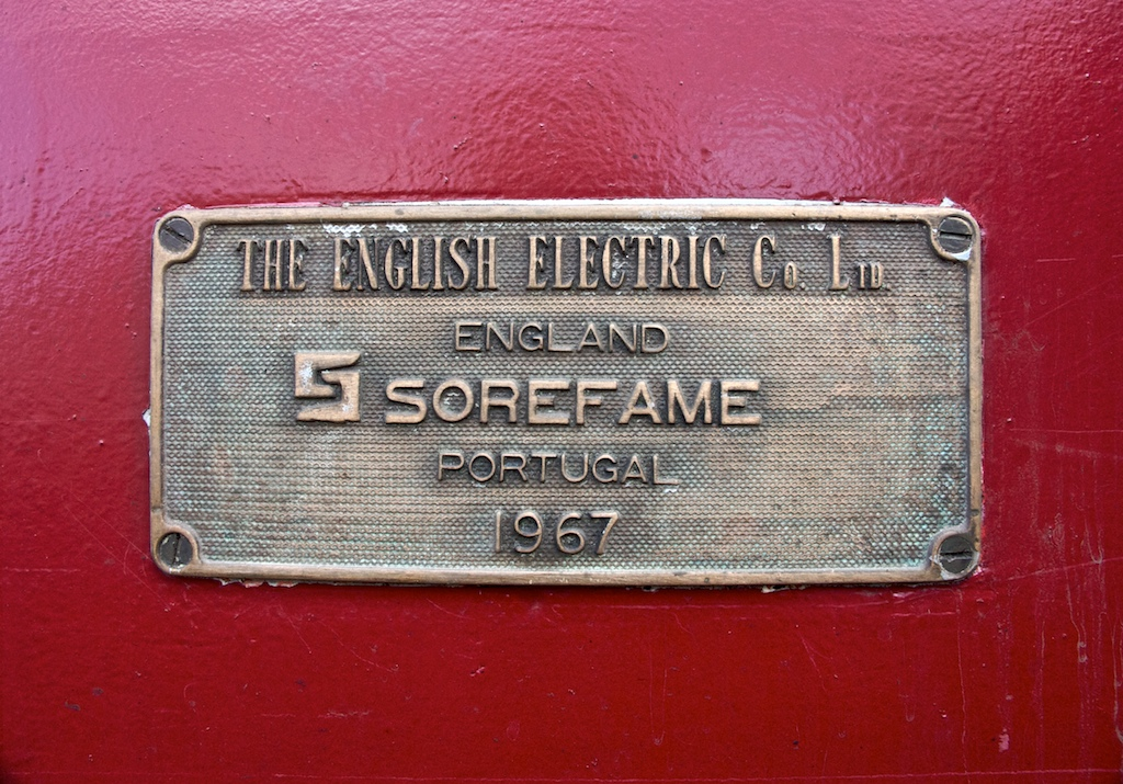 pormenor da placa. Local: Poceirão [Linha do Alentejo, PK 30] Data e hora: 31 de Agosto de 2008 [11h13] Material: Locomotiva 1449 [English Electric • Sorefame] N.º UIC: 9094 110 1449-3 (Takargo Rail)